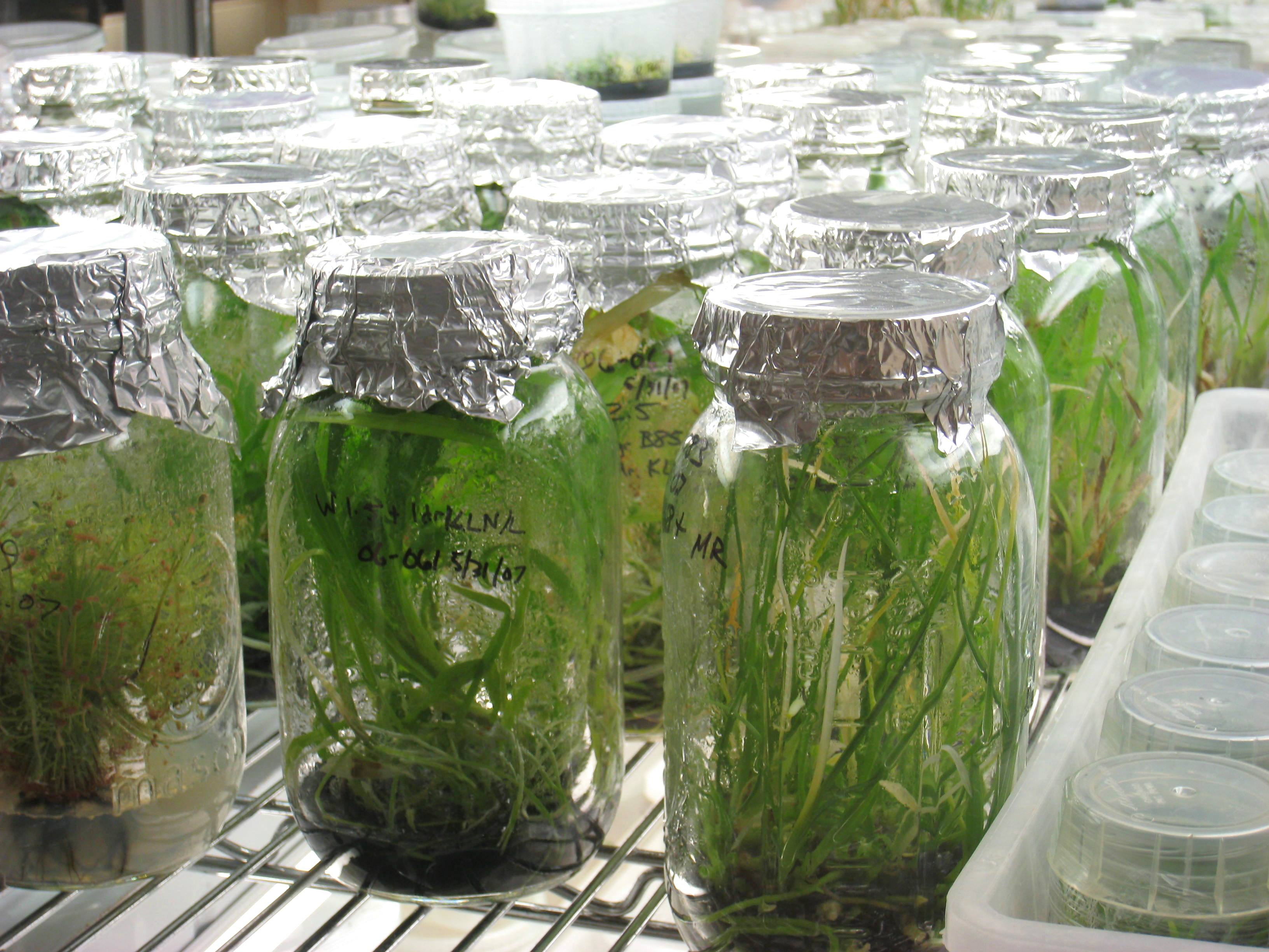 Plant Tissue Culture Lab detail, Atlanta Botanical Garden, Atlanta, Georgia, USA.